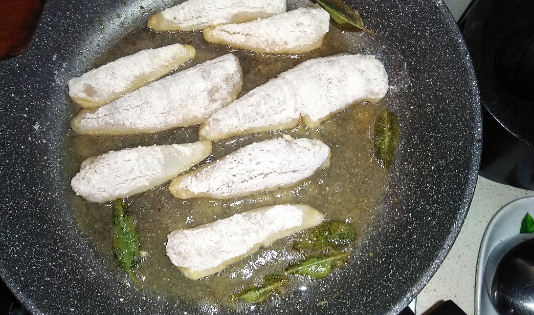 Filetti di gallinella (Chelidonichthys lucerna) al burro e salvia in fase di cottura